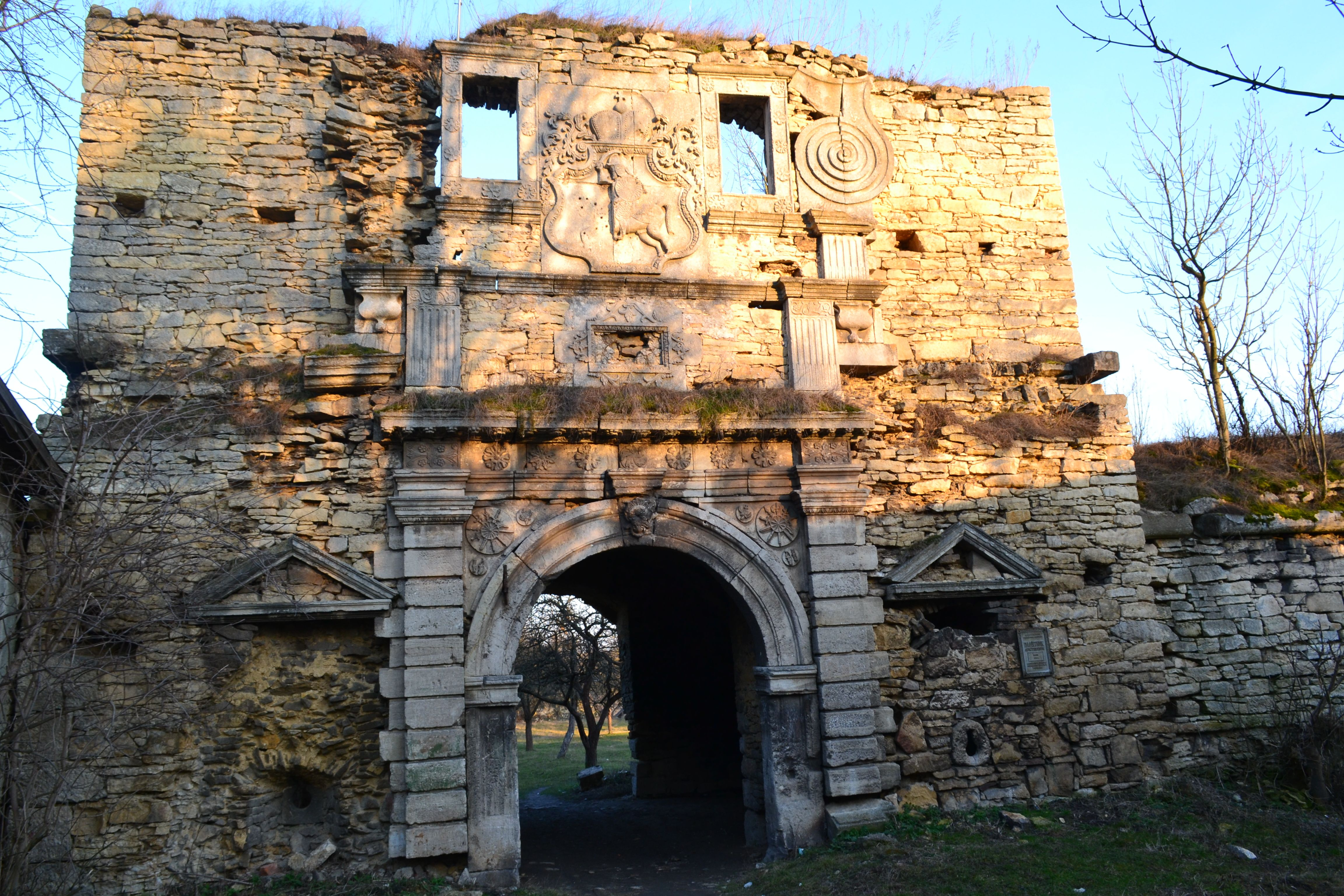 Замок (мур.), Чернелиця, вул.Лесі Українки, 1